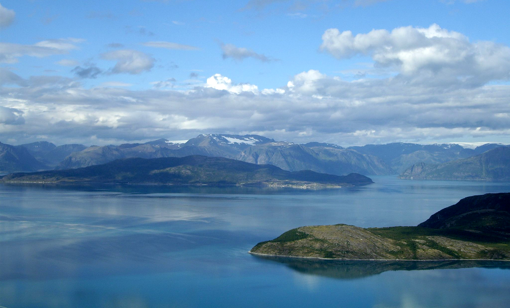 Alta fjord, Finnmark, Norway.